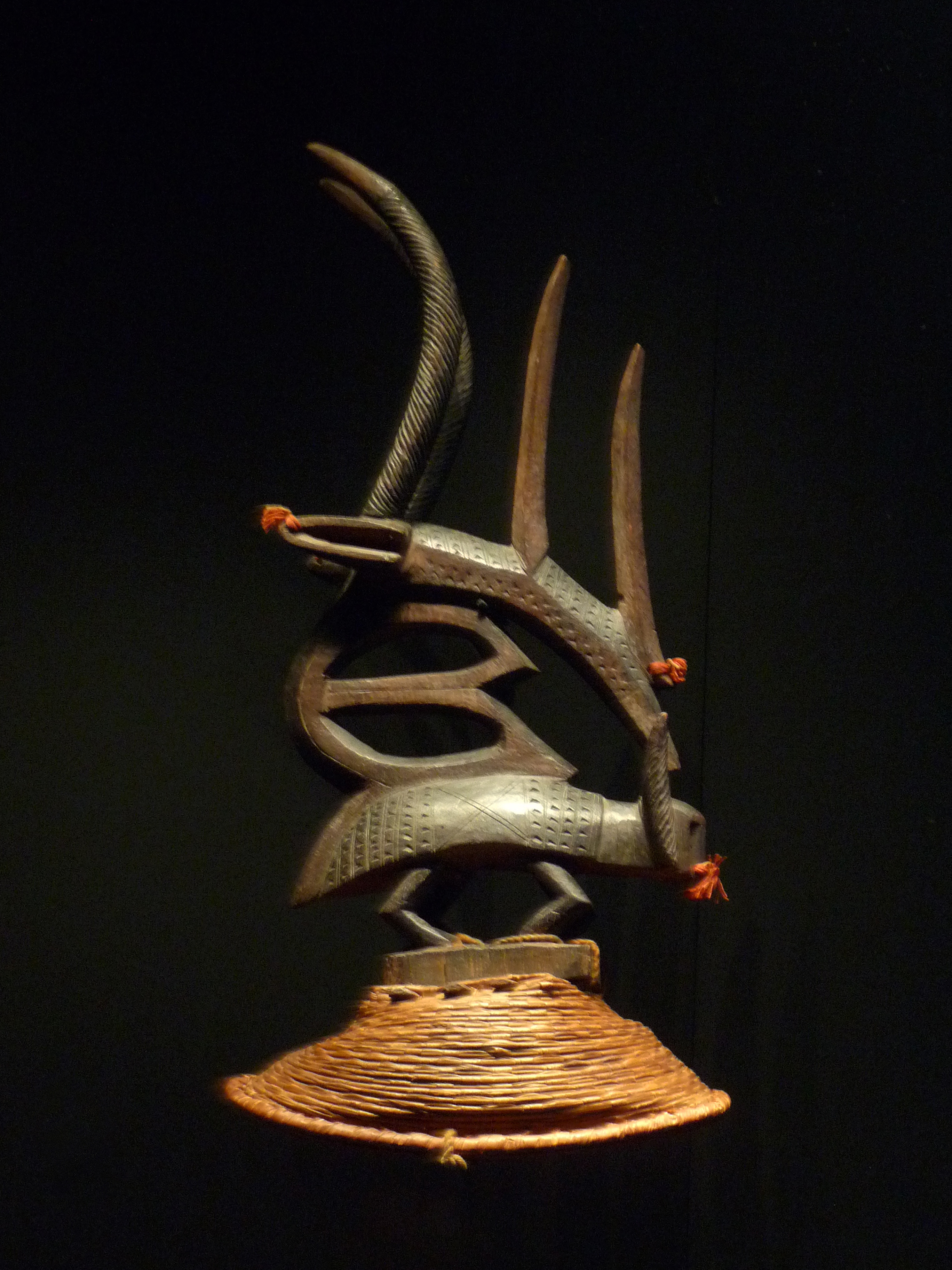 Masque cimier, société d'initiation Ciwara, population Bamana, Mali, Bamako, avant 1930. Bois, fibres végétales, coton, ficelle. Musée du quai Branly.